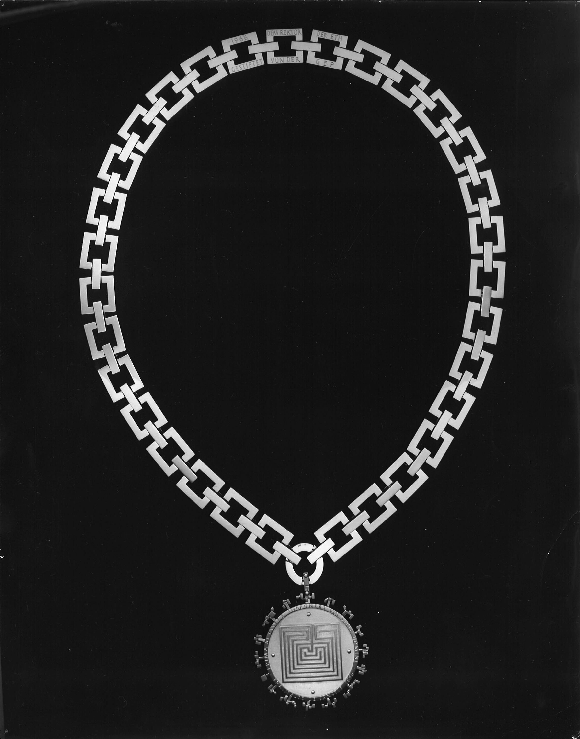 Rektorenkette und Vorderseite des Medaillons mit dem Labyrinth und einer umlaufenden Inschrift: PRIMA DI ESSERE INGEGNERI VOI SIETE UOMINI. FRANCESCO DE SANCTIS 1856.